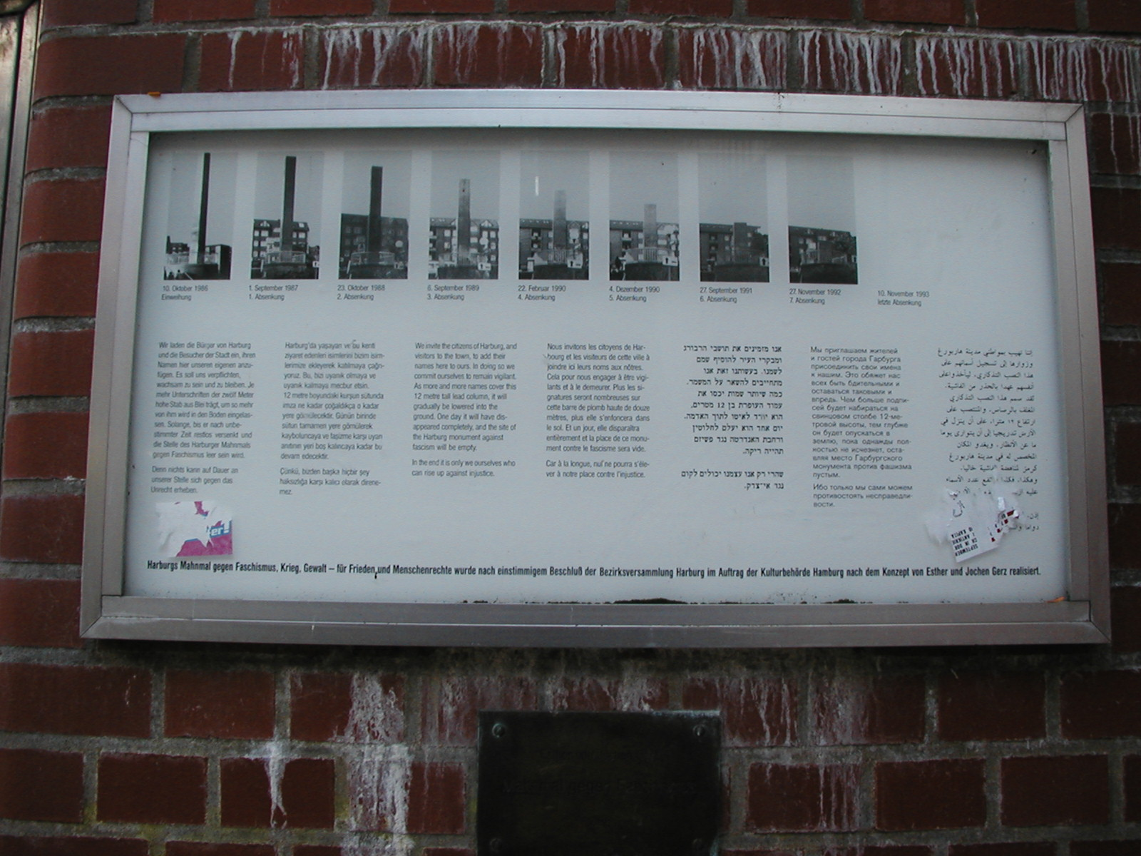 Die Tafel an Jochen Gerz' Harburger Mahnmal gegen den Faschismus, am Tunnel zwischen Sand und Rathausmarkt